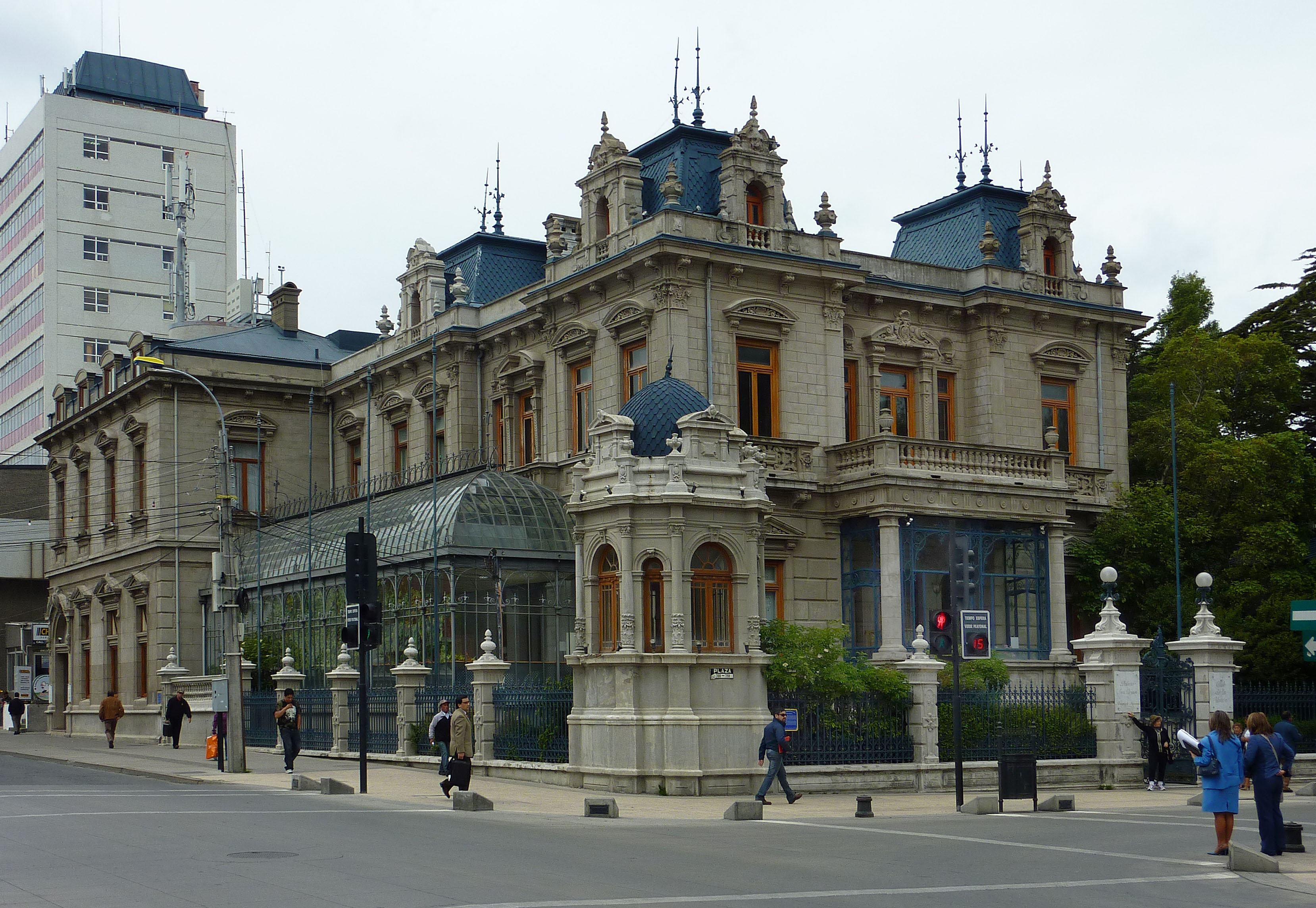 Antarctic Cruise: Punta Arenas, Chile